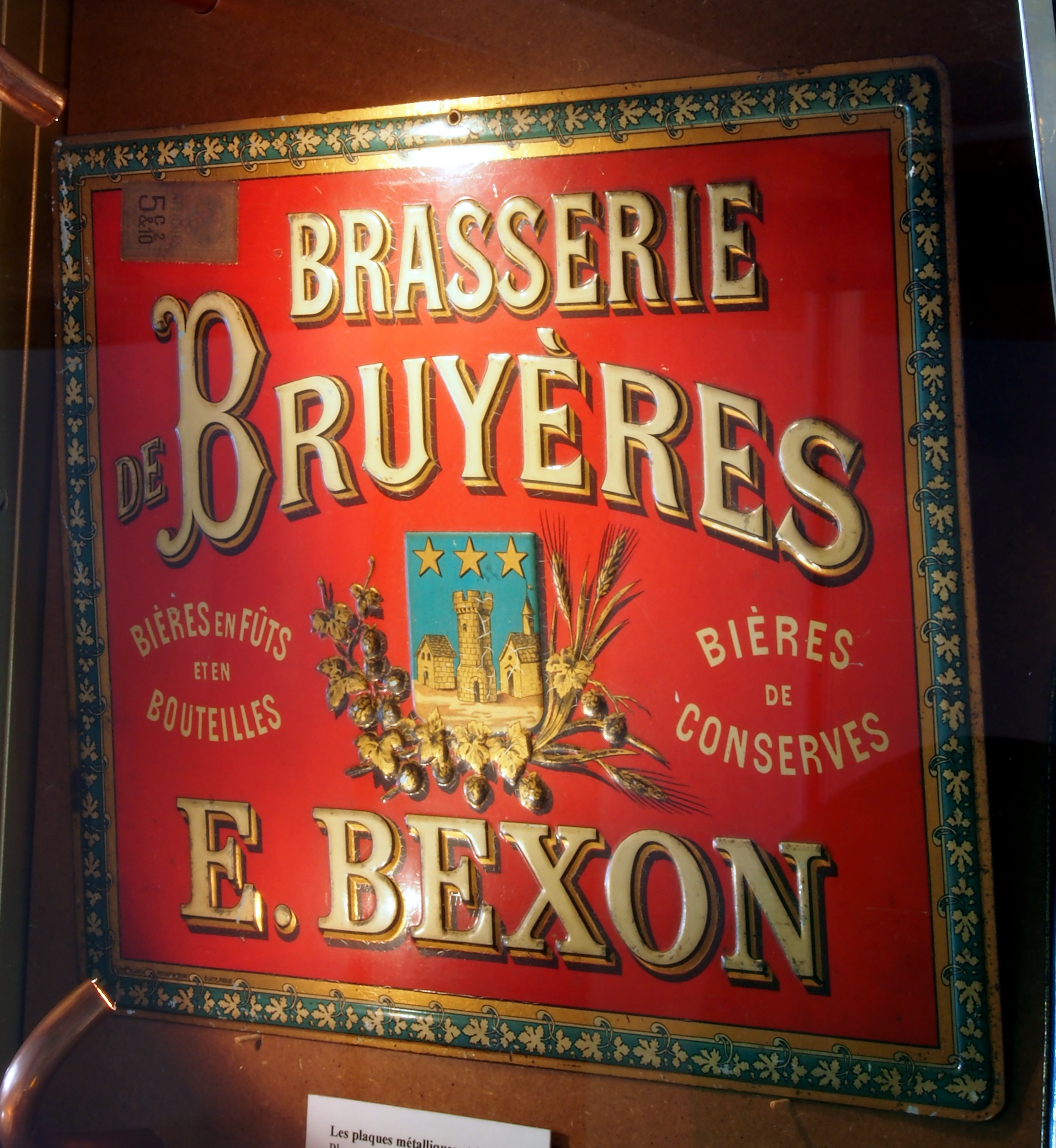 Brasserie de Bruyères, E Bexon, very old enamel advertising sign.